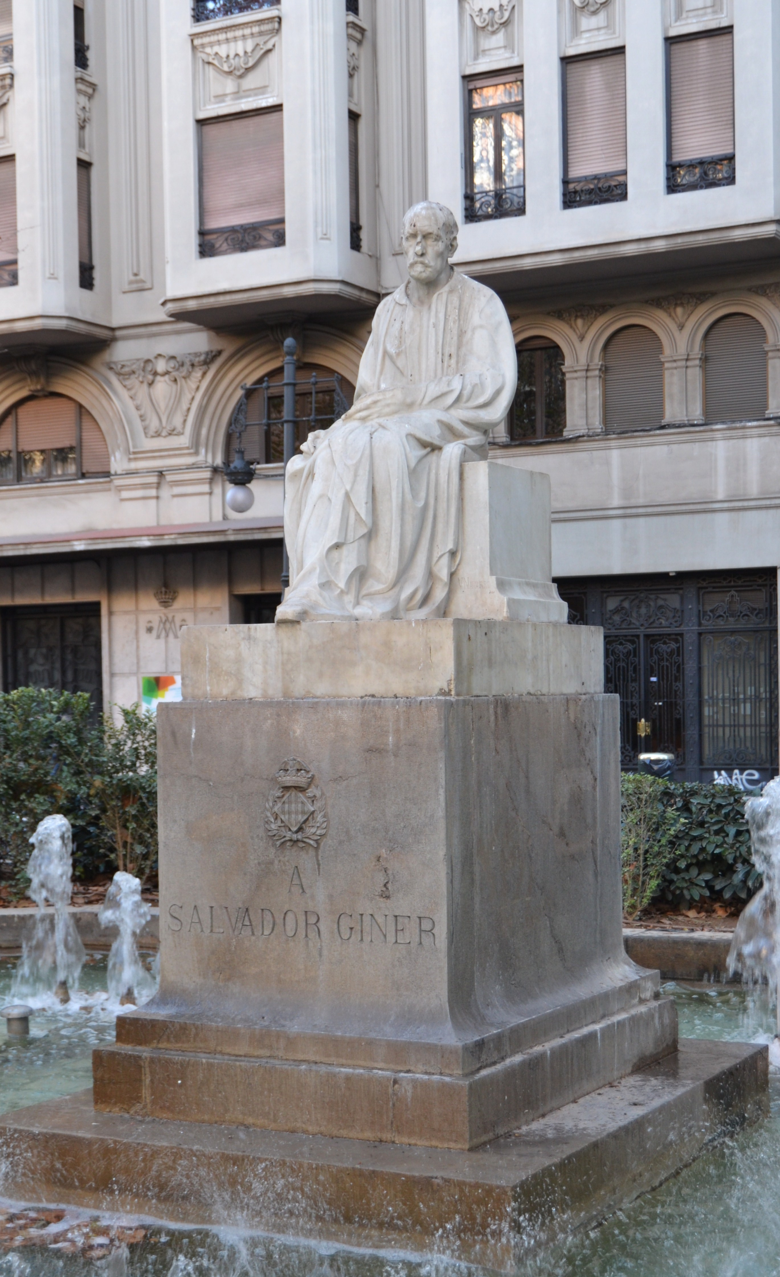 València, monument a Salvador Giner.